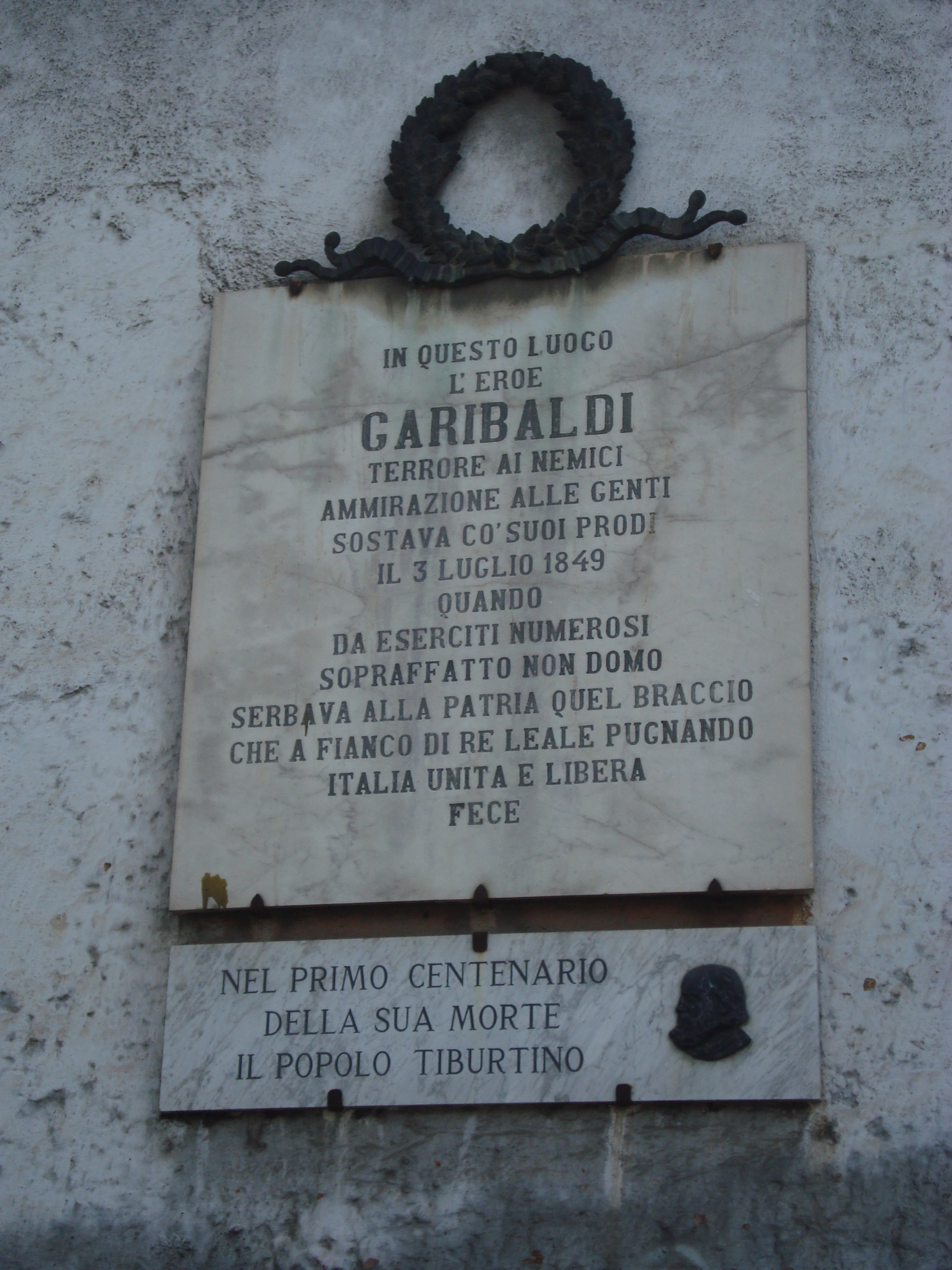 Plaque commémorative du passage de Giuseppe Garibaldi à Tivoli le 3 juillet 1849. Traduction : En ce lieu, Garibaldi le héros, terreur des ennemis, et admiré des bons, s'est arrêté avec ses hommes, le 3 juillet 1849, quand défait mais pas vaincu par une armée nombreuse, il réserva à la patrie, son bras armé, au côté du roi loyal (Victor Emmanuel II), pour l'unité de l'Italie et la liberté. Pour le premier centenaire de sa mort, la population tiburtine.